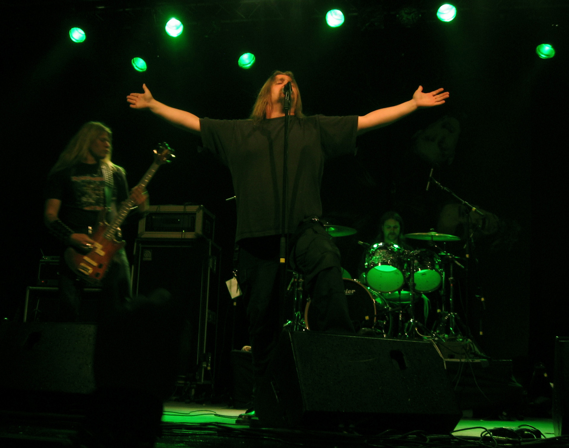 Matti Kärki, sångare i bandet Dismember, live trästock 2005